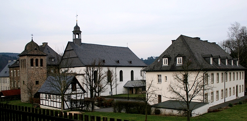 Ehemaliges Kloster Rumbeck in Arnsberg, Stadtteil Rumbeck.